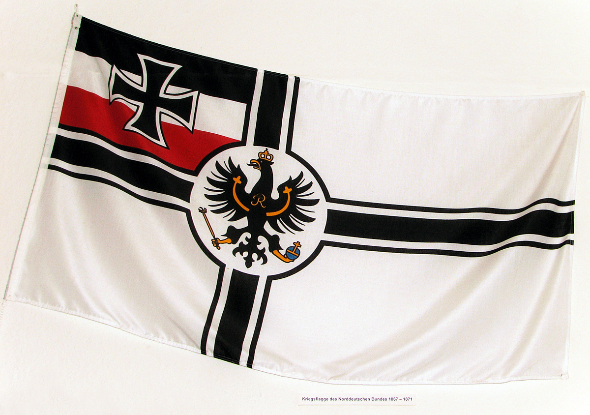 Dieses Bild zeigt die Kriegsflagge des Norddeutschen Bundes (1867-1871).